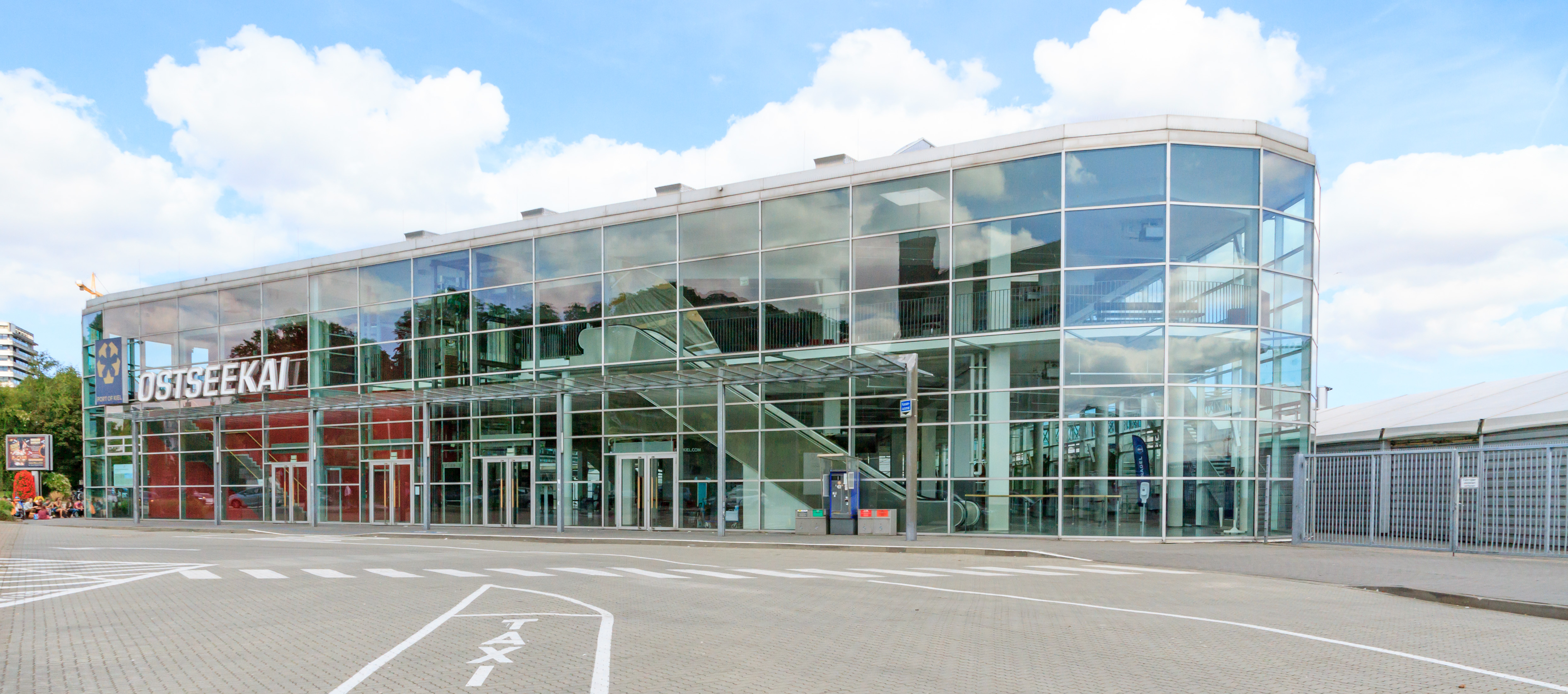 Ostseekai